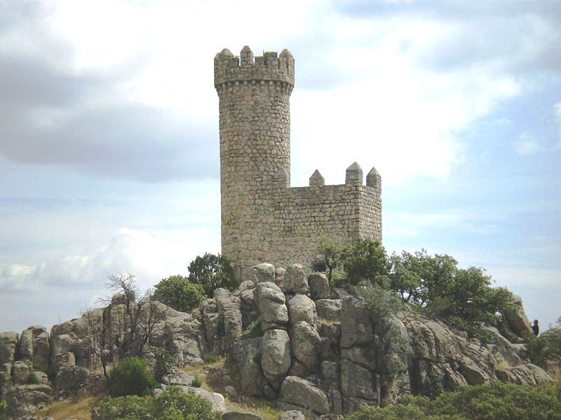 Torre vigía de Torrelodones